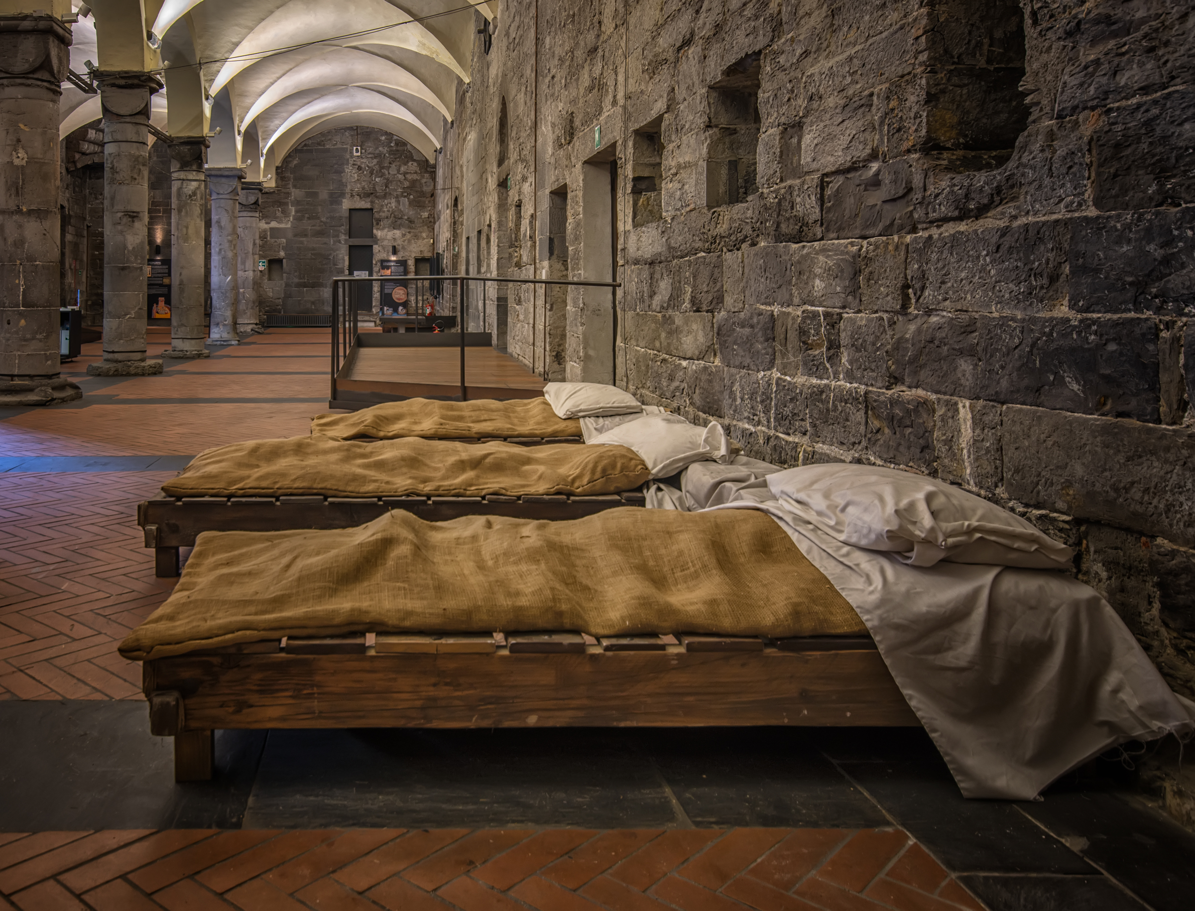 commenda di San Giovanni di Pré This is a photo of a monument which is part of cultural heritage of Italy.